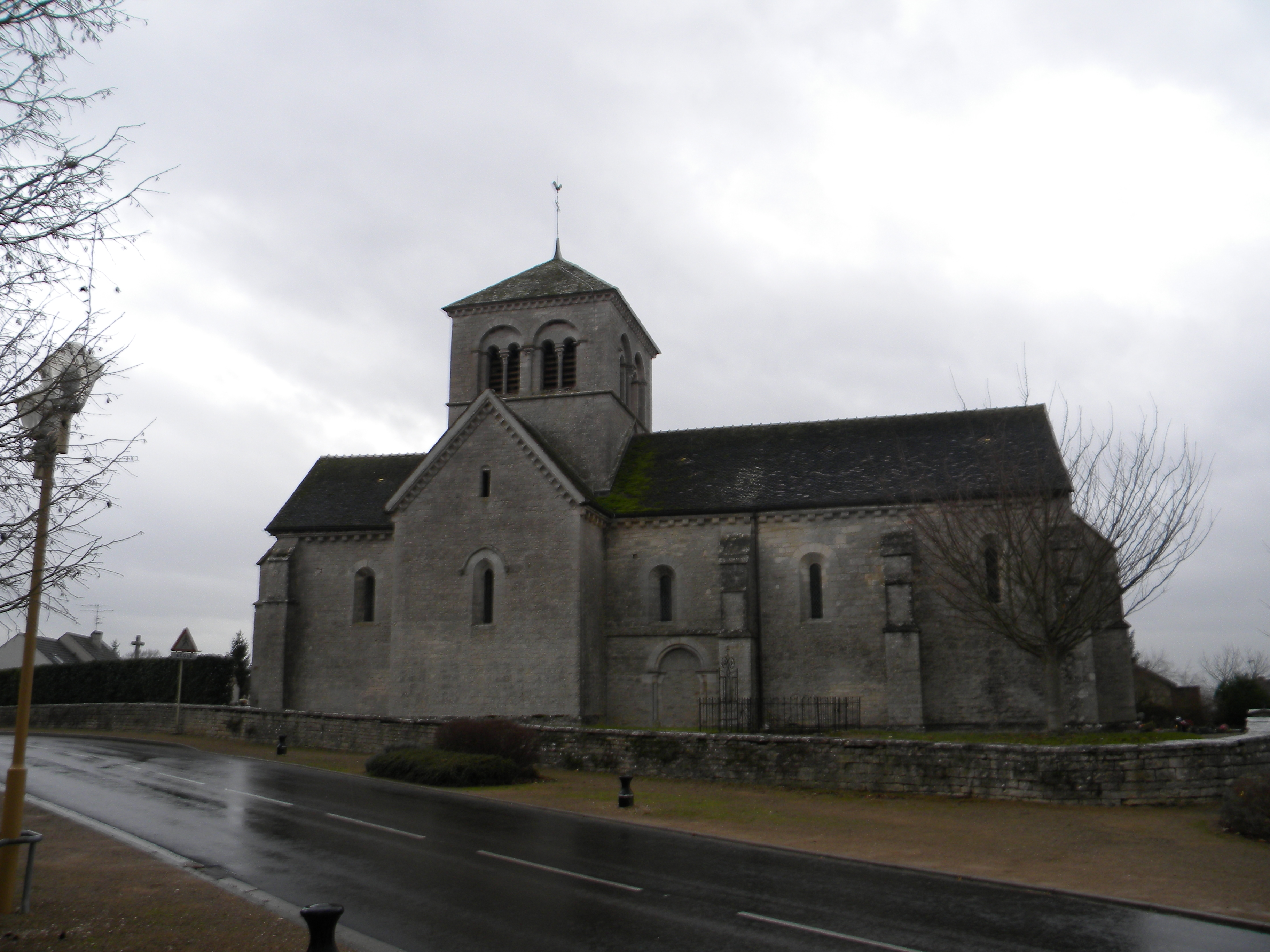 Eglise de Gerland